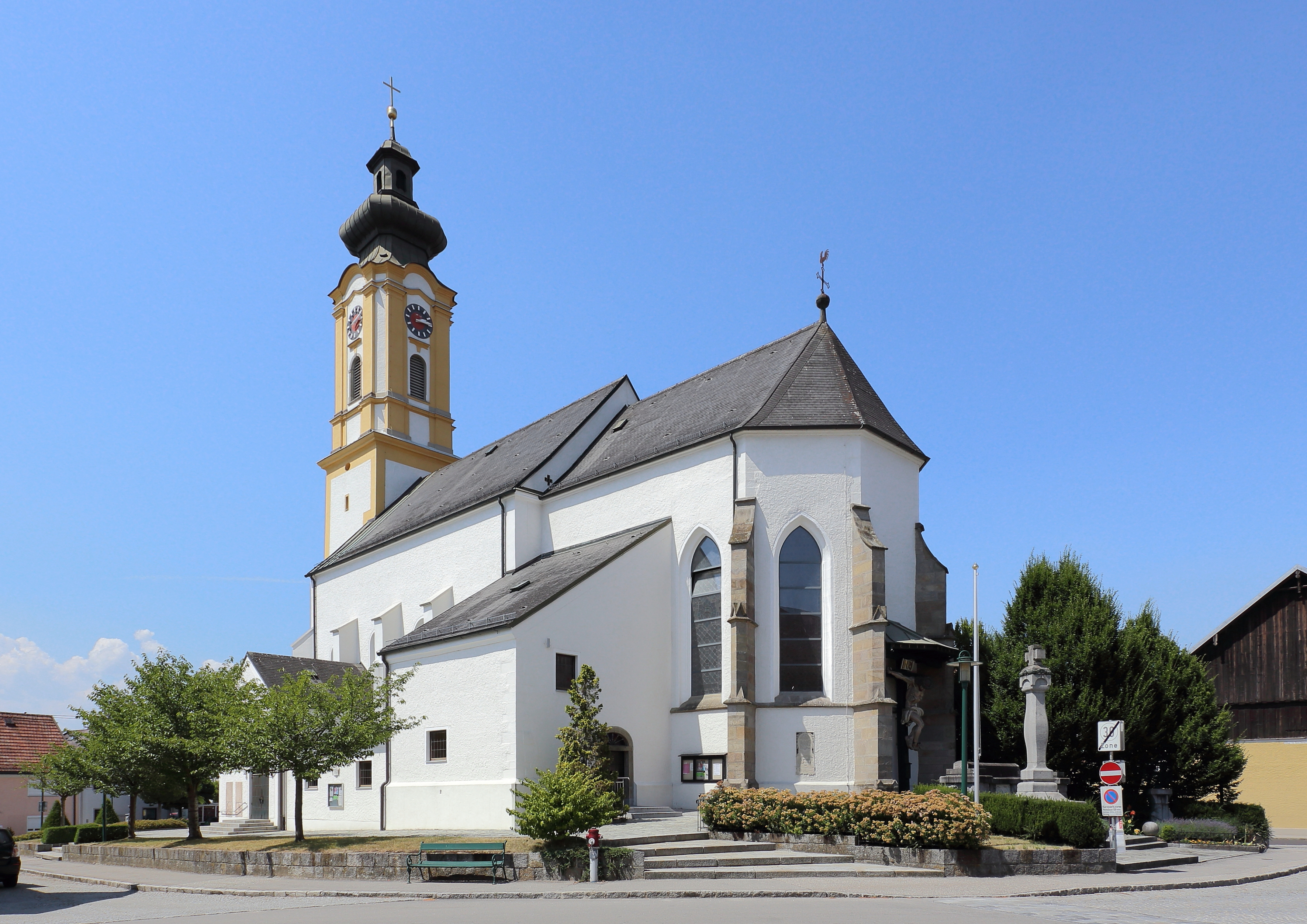 Die röm.-kath. Pfarrkirche hl. Stephan in der oberösterreichischen Marktgemeinde Andorf. Der Chor und der Unterbau des Turmes ist gotisch. Das Langhaus errichtete der Schärdinger Baumeister Georg Türk in den Jahre 1760 bis 1762 im barocken Stil. Die Glockenstube des Kirchturmes wurde 1745/46 sowie 1818/19 umgebaut.